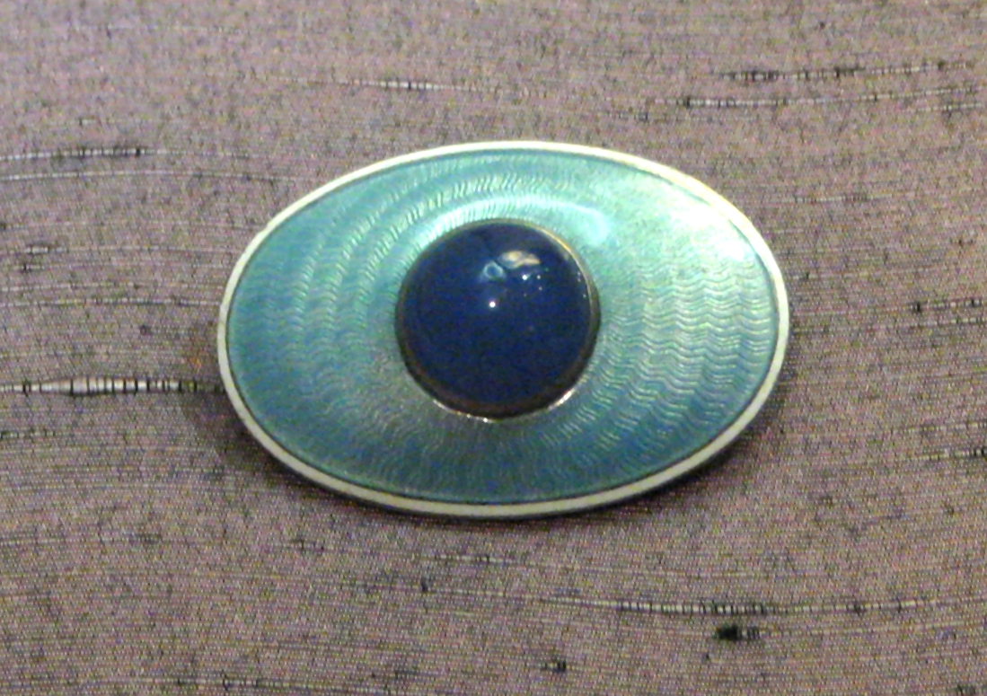 Брошь. СПб, 1908-17. Мастерская И. Брицына. Сапфирин, серебро, эмаль. Собрание В. Кириченко.